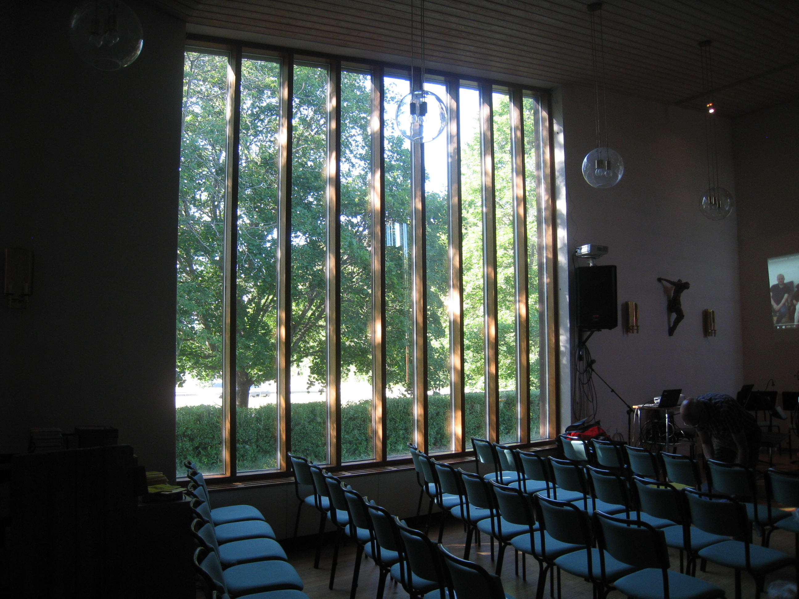 Interiör i musiksalen i Bromma folkhögskola, Åkeshovsvägen 29, Nockebyhov, Bromma, Stockholm.